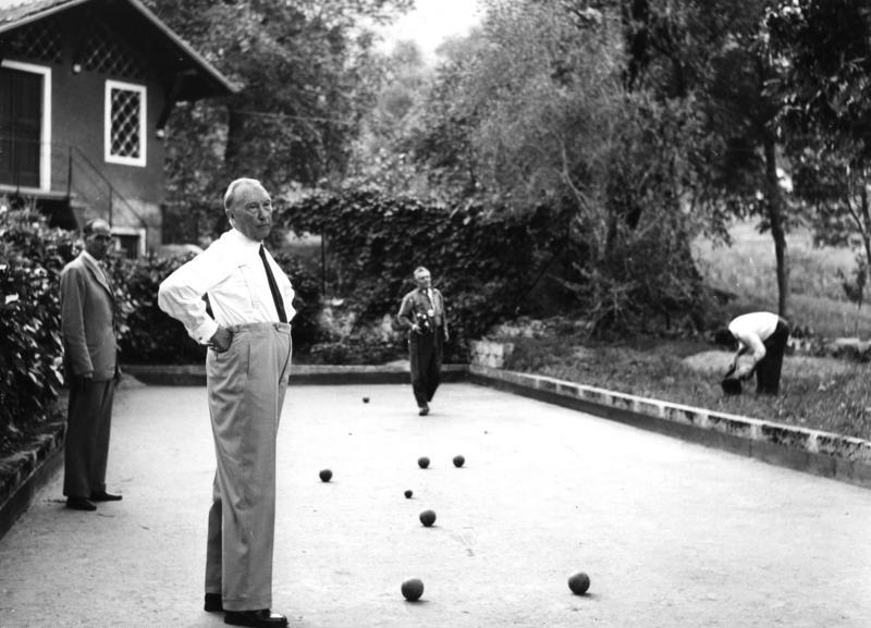 Bundeskanzler Konrad Adenauer mit seiner Familie beim Bocciaspiel in Cadenabbia am 30.8.1958